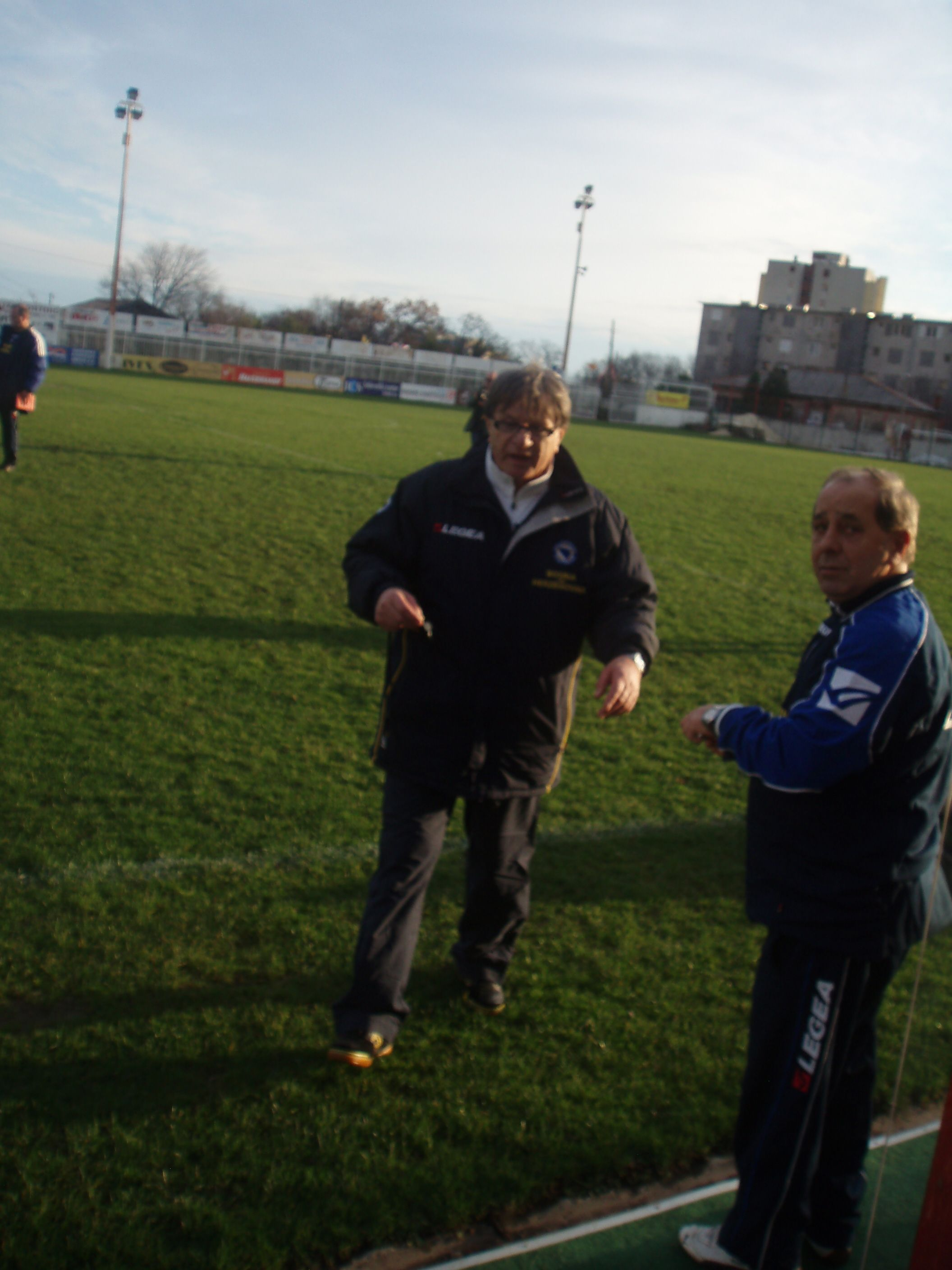 Ćiro Blažević na Orijentovom igralištu u Rijeci